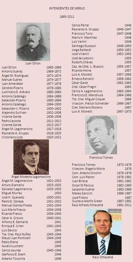 Lista de los intendentes del Partido de Merlo, argentina, desde 1865 hasta hoy.